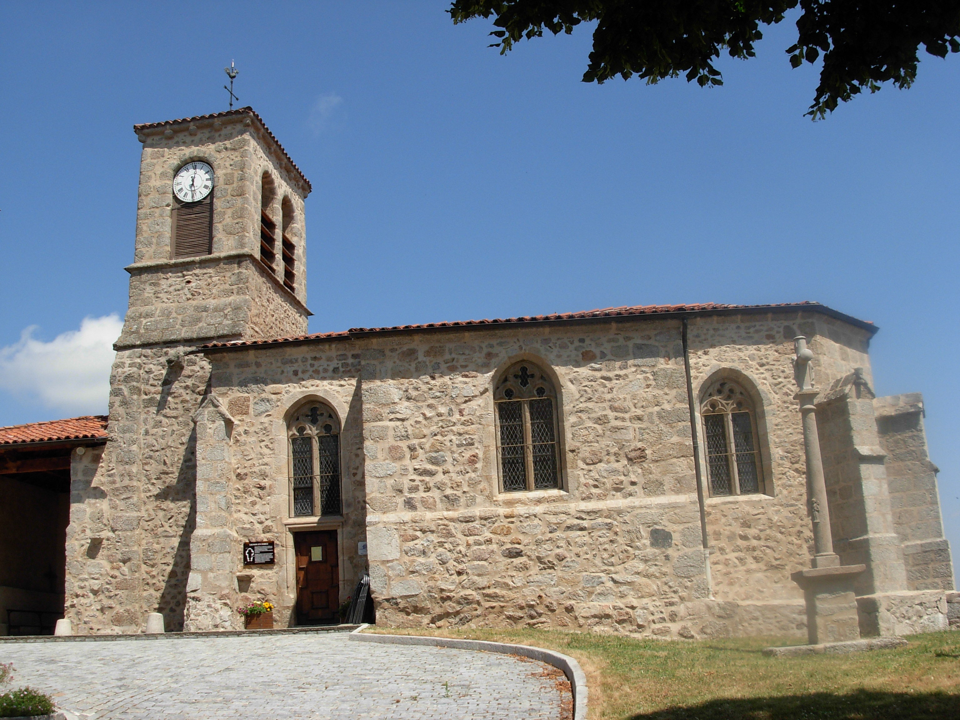 Église Saint-Pierre de Palogneux, (Inscrit, 1991) .